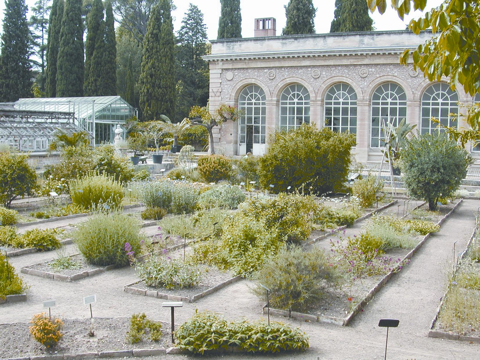 La Jardin des Plantes de Montpellier avec la serre Martins Photographie personnelle prise en mai 2005